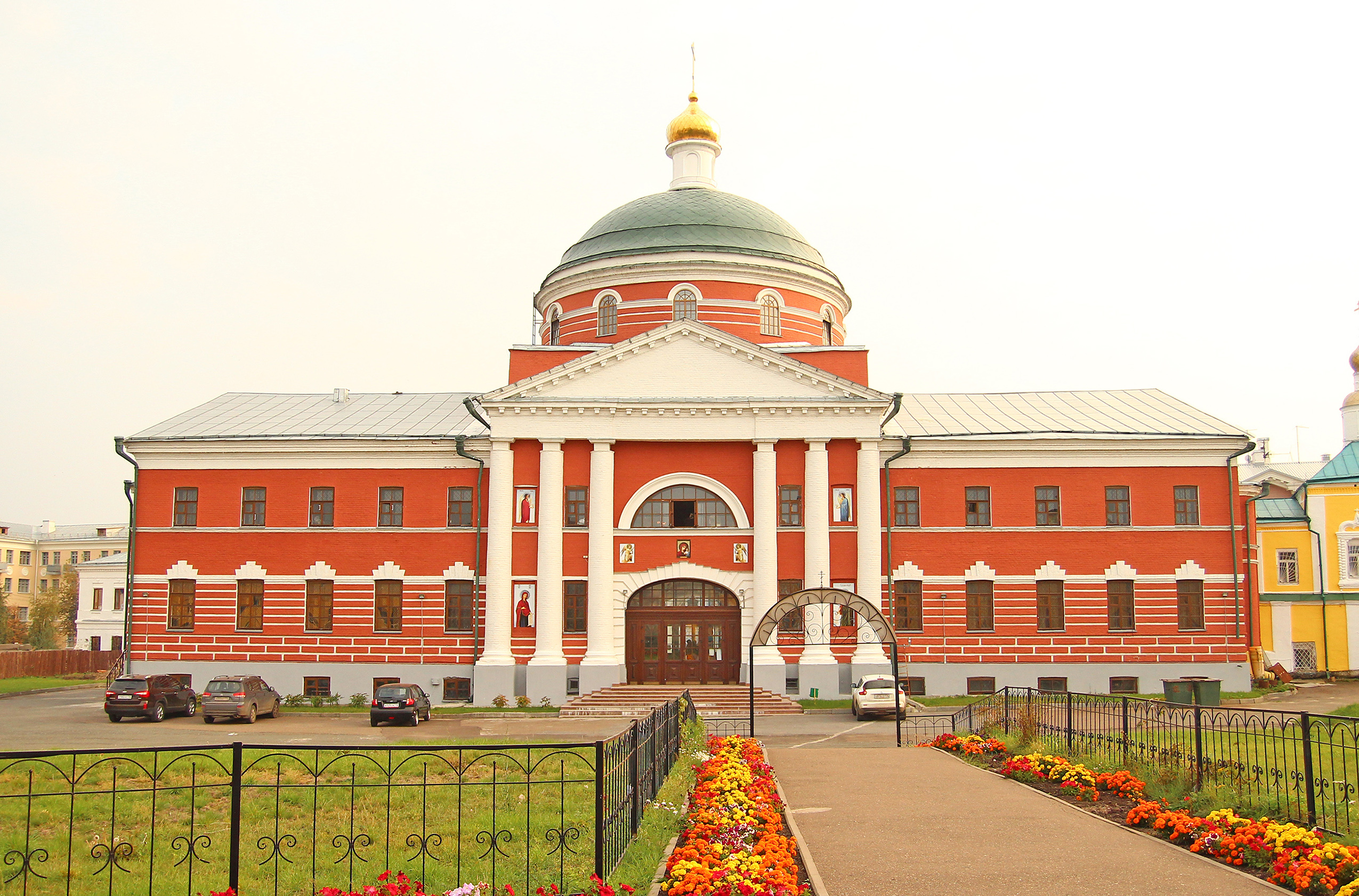 Монастырь Богородицкий (Республика Татарстан, Казань, Большая Красная улица, 5, Миславского улица, 11)